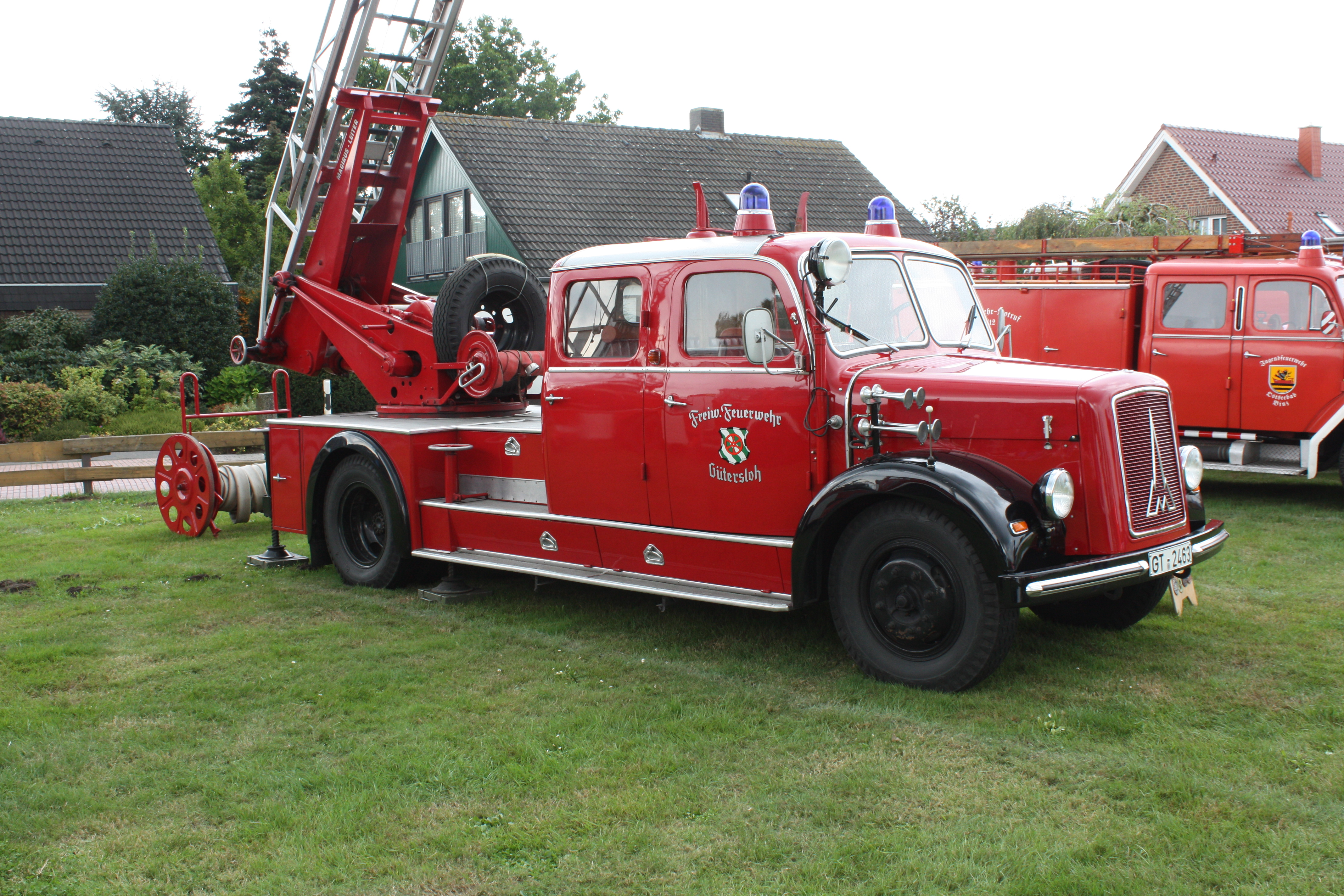 Fire engines in Greffen